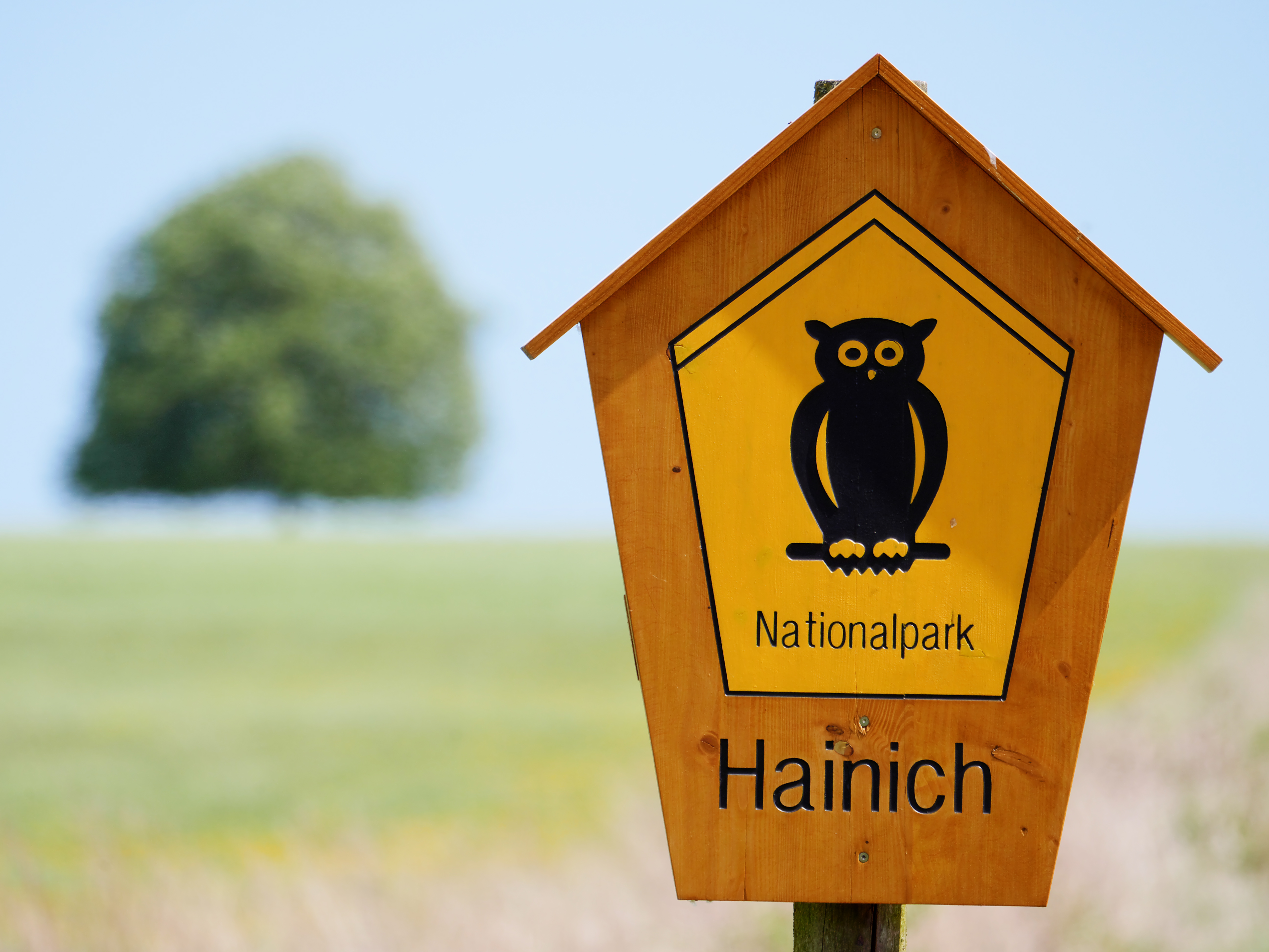 Nationalpark Hainich, Thüringen, Deutschland, Hinweisschild am Parkplatz bei Berka